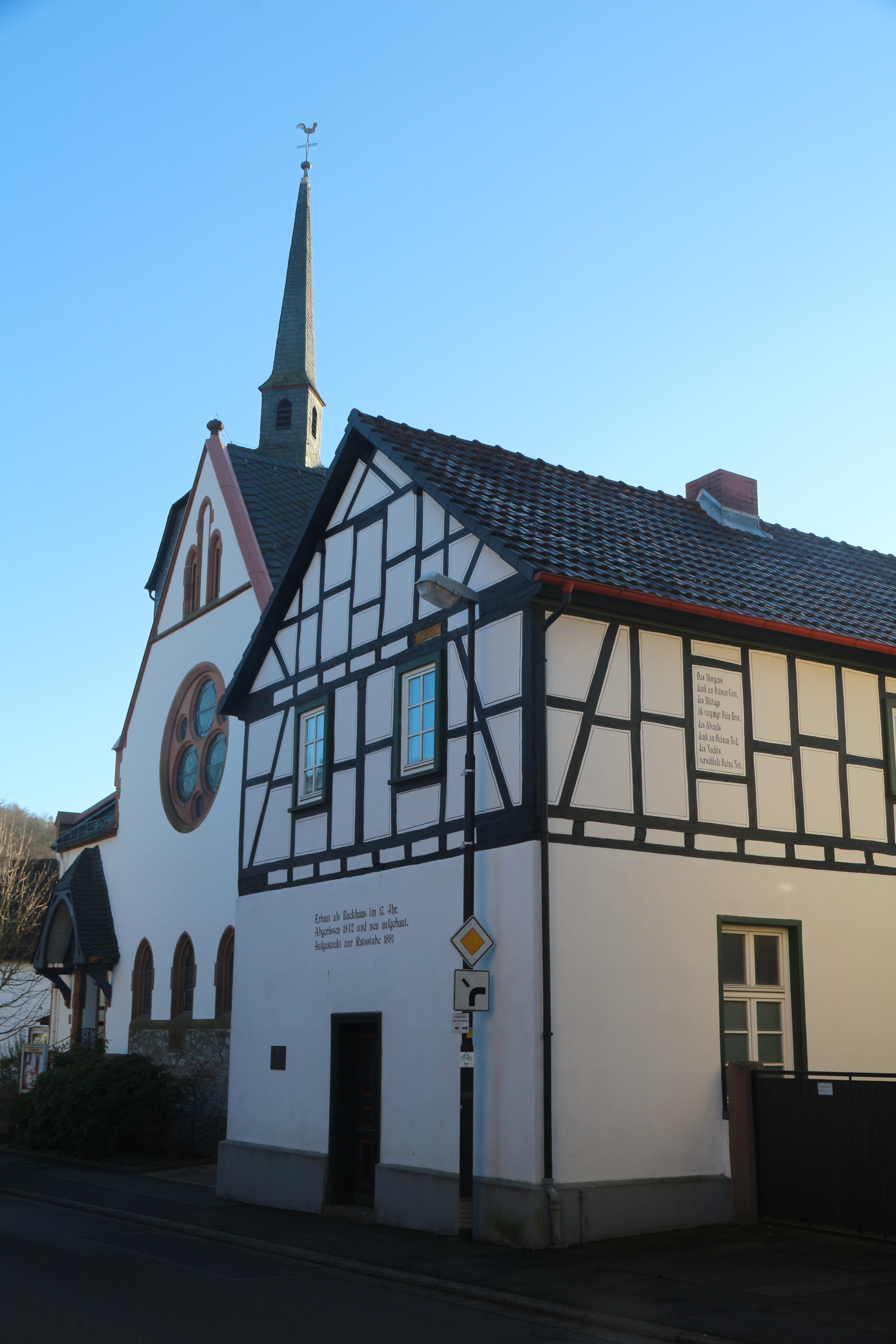 Fellingshausen